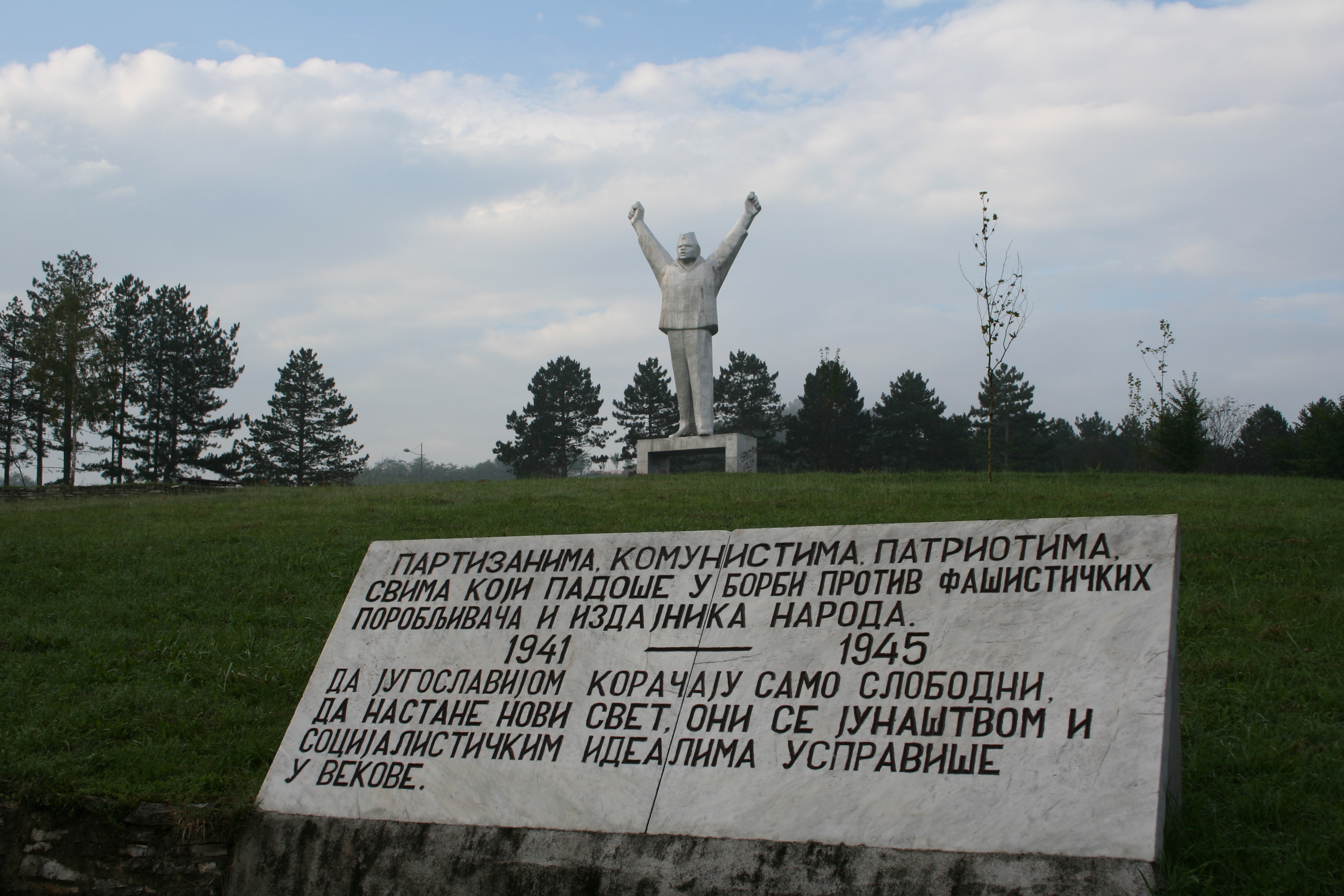 Spomenik borcima revolucije, Valjevo